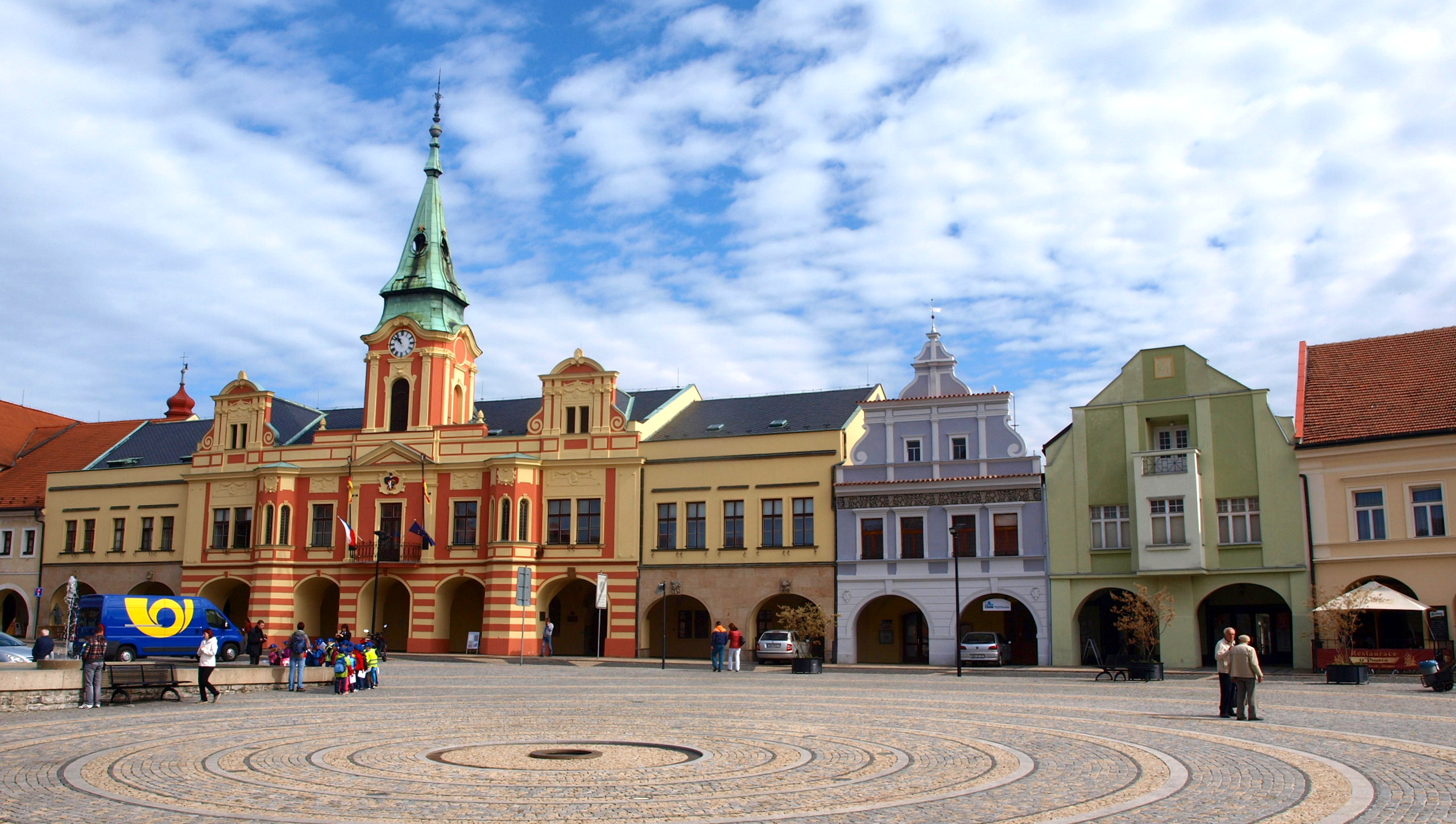 Mělník náměstí